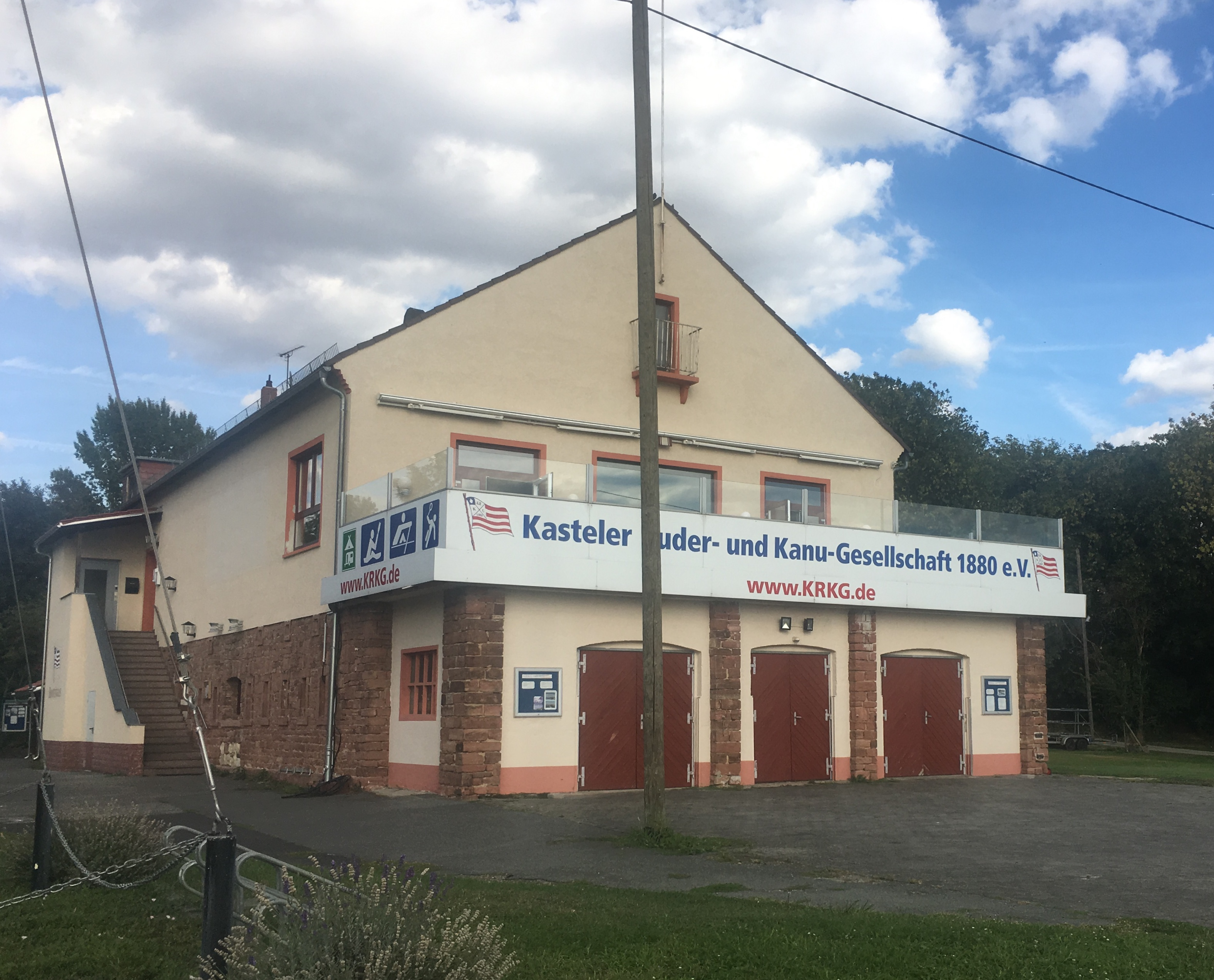 Kasteller Ruder und Kanu Gesellschaft